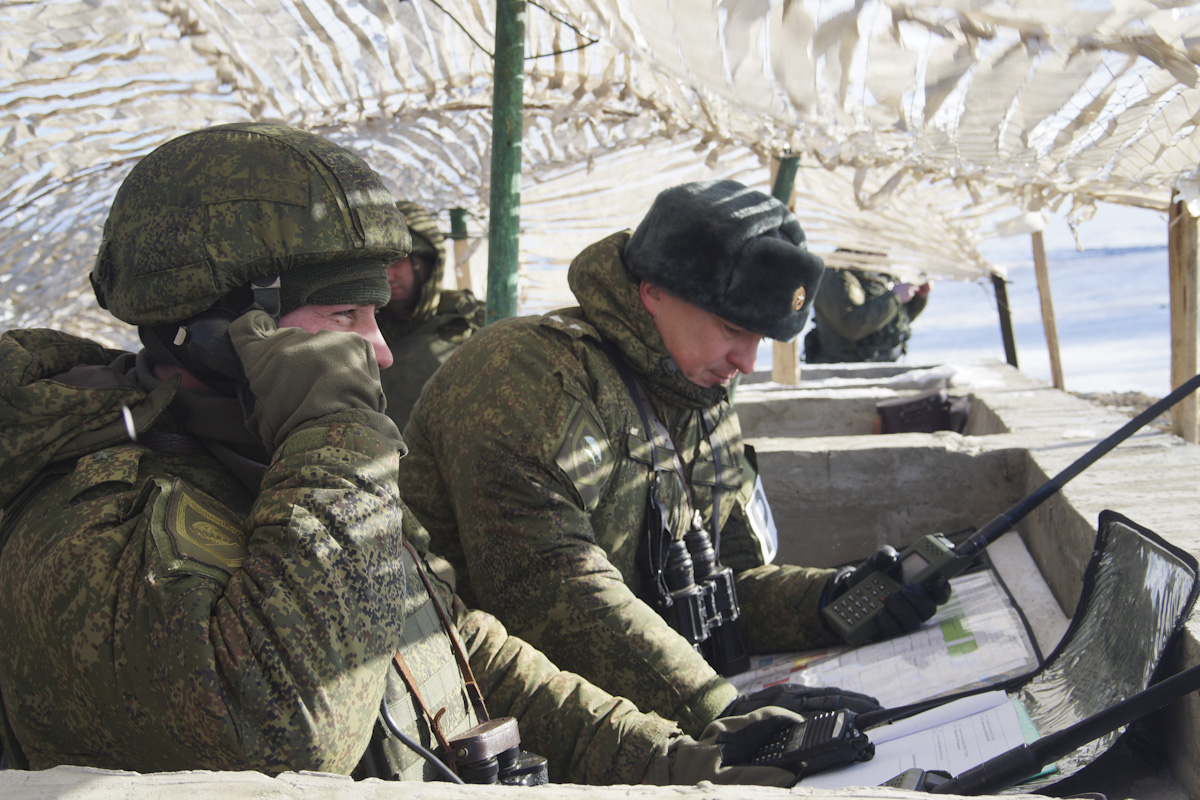 Тактическое учение с подразделениями 247-го гвардейского десантно-штурмового Кавказского казачьего полка в Ставропольском крае.